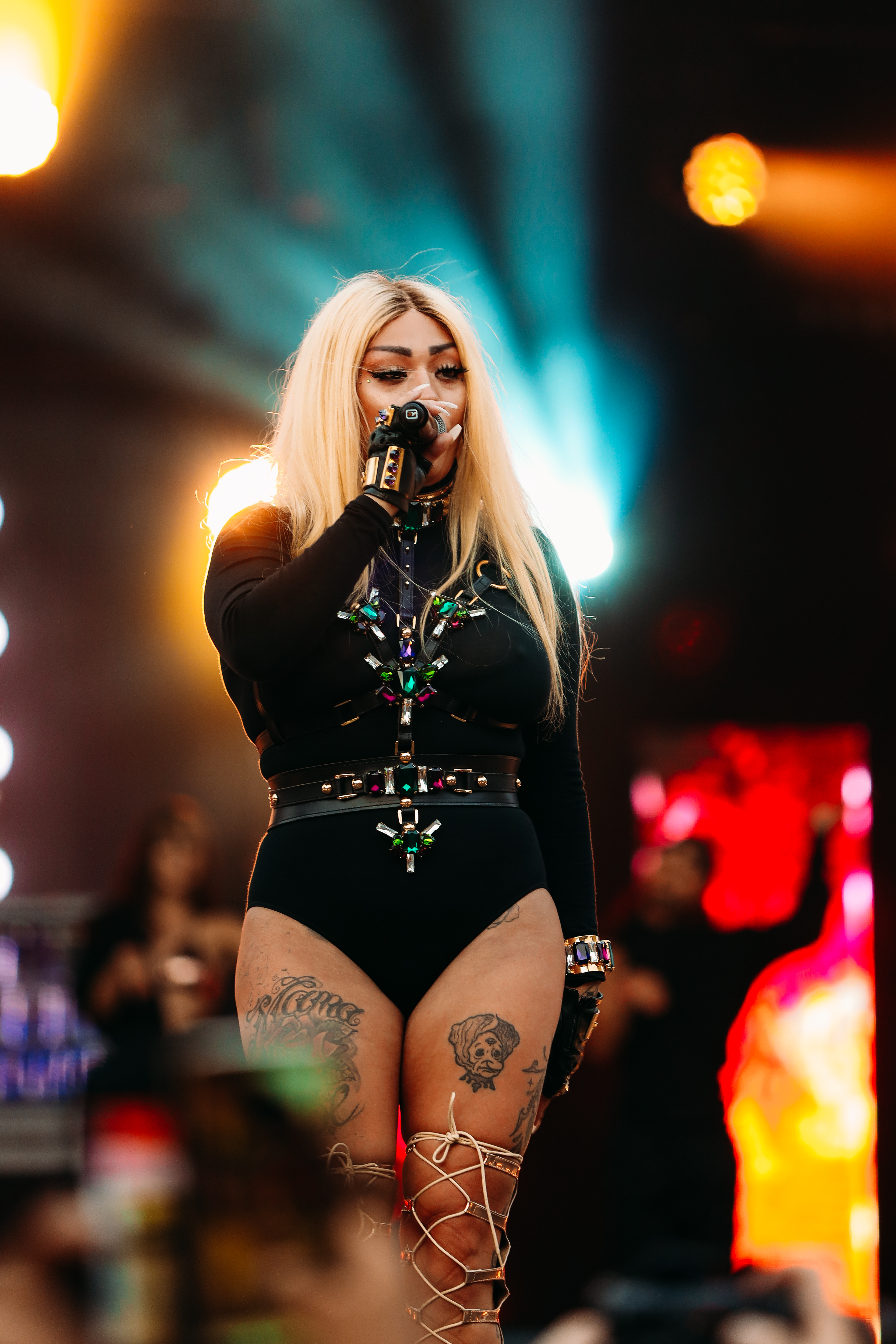 Mutya Buena tijdens de closing party van Pride Amsterdam 2019